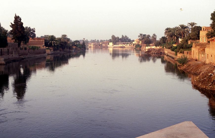 بحر يوسف بمحافظة المنيا